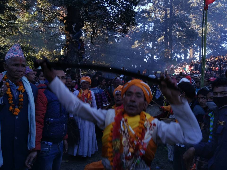 नेपाल भाषा: thula kedaar baba